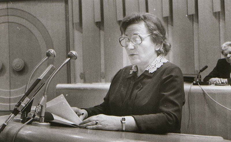 Nevenka Petrić za govornicom.